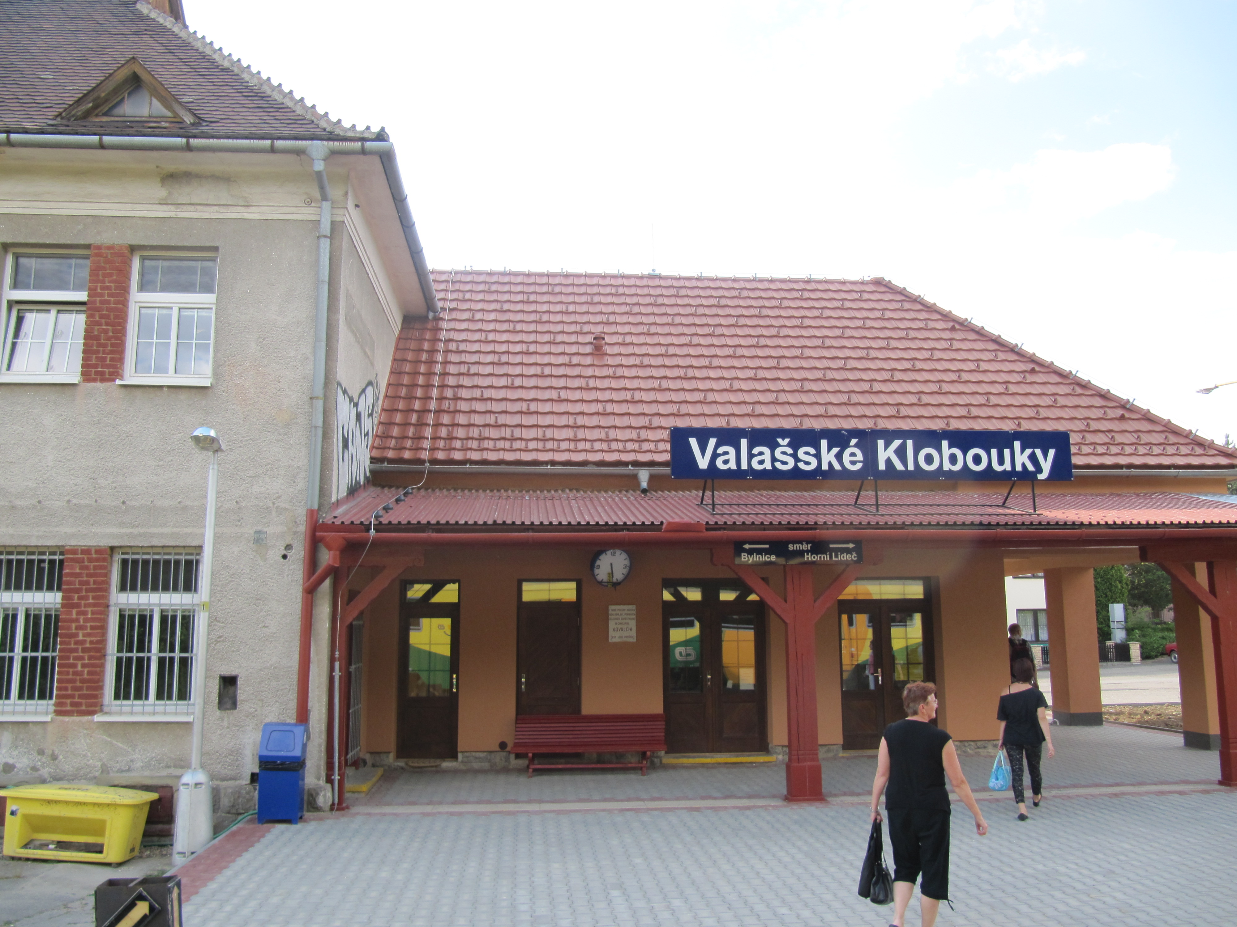 Valašské Klobouky, nádraží